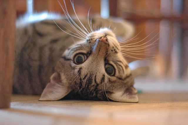 "Food? Food? Go away."